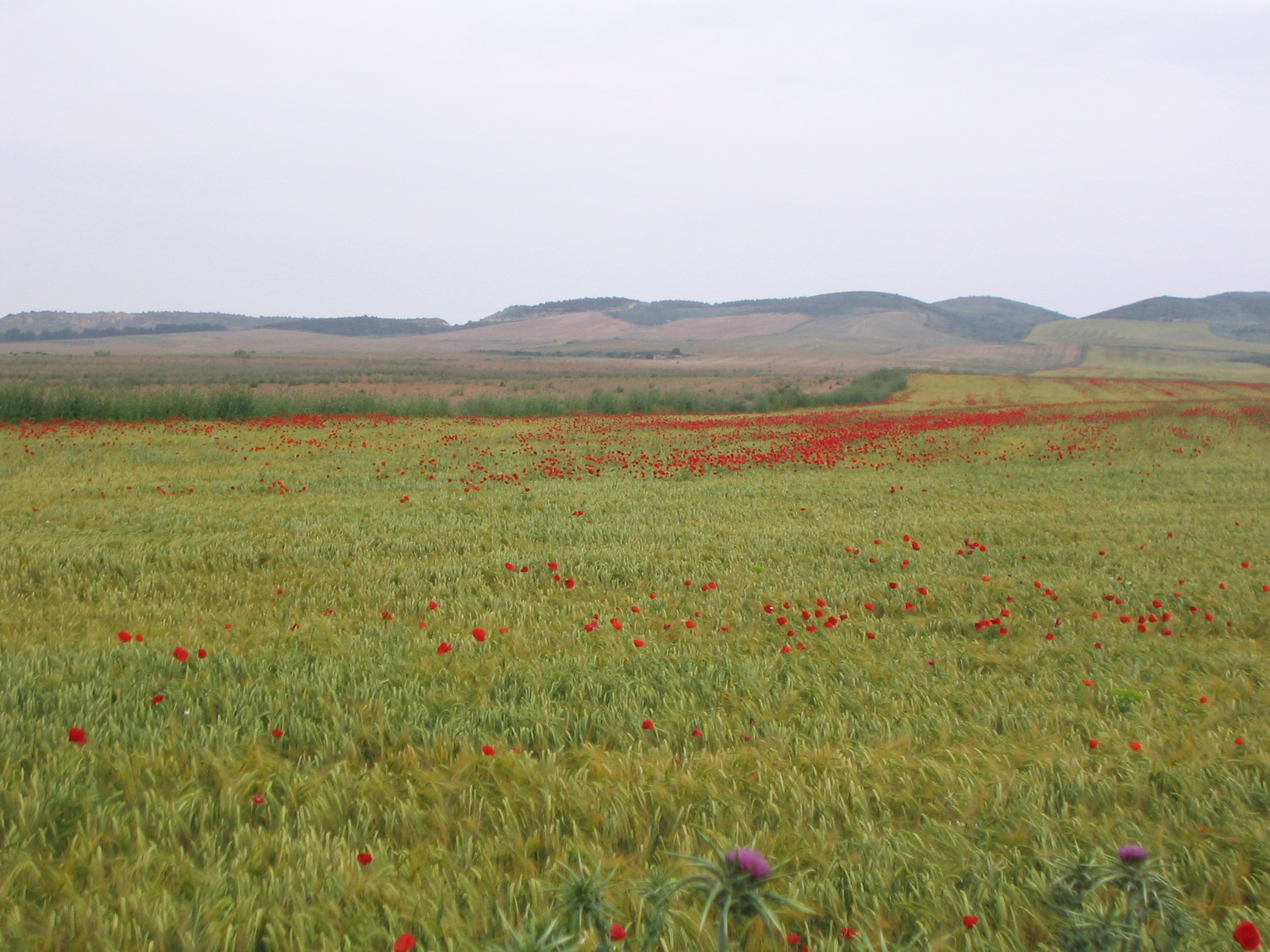 Paisaje de las Bardenas Reales de Navarra